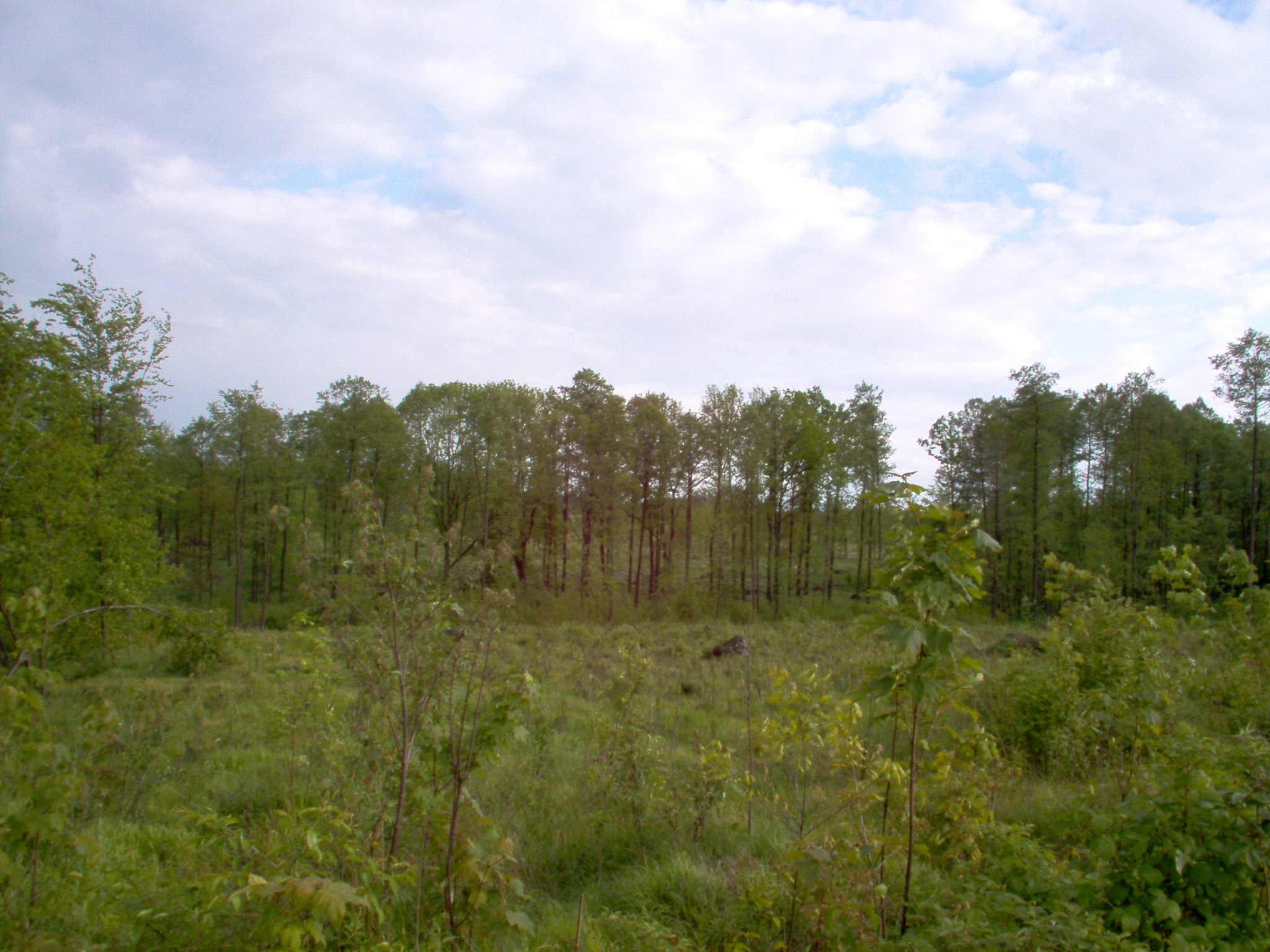 Katowicki Park Leśny - Giszowiec